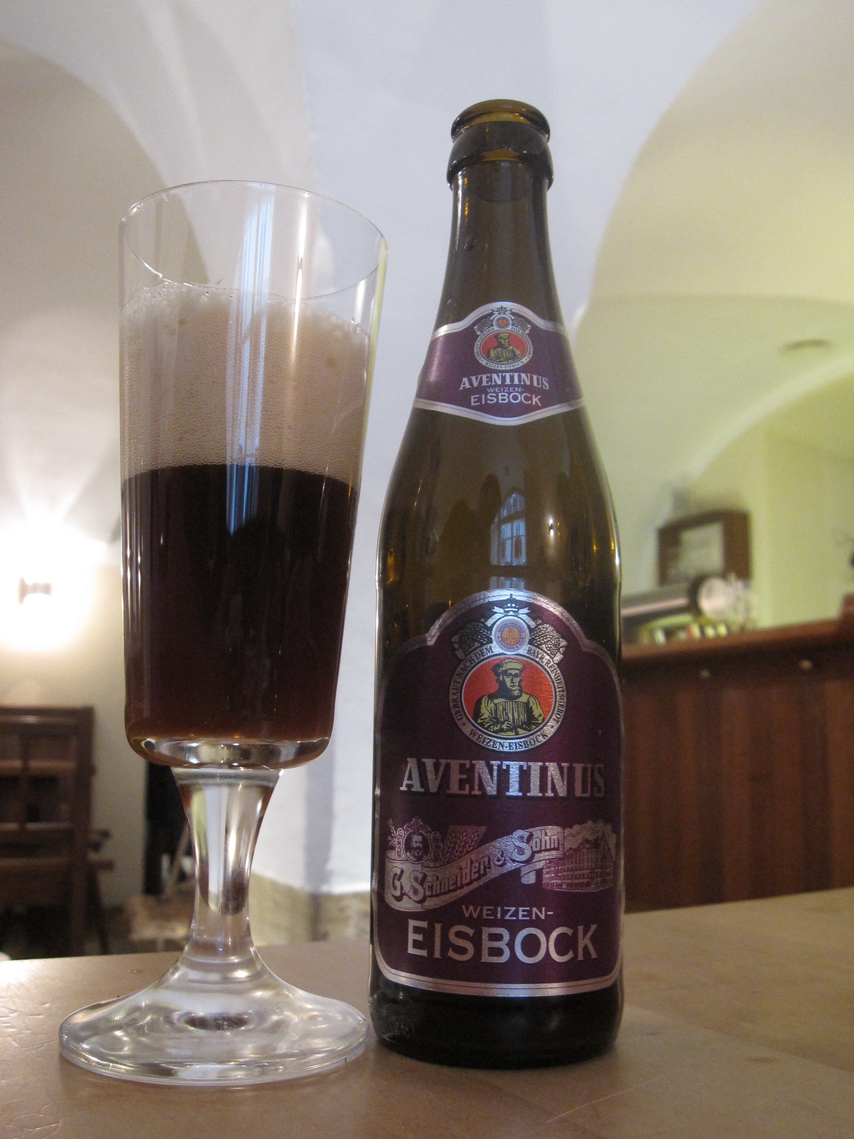 A bottle of Aventinus Weizen-Eisbock from Weissbierbrauerei G. Schneider & Sohn in Kelheim, Germany, at Weisses Brauhaus bräustüberl - the brewery tap. Schneider Aventinus Weizen-Eisbock is a 12% abv eisbock version of the regular Schneider Weisse Aventinus Weizen Bock. This one was bottled in August 2012, a month before my visit to the brewery.